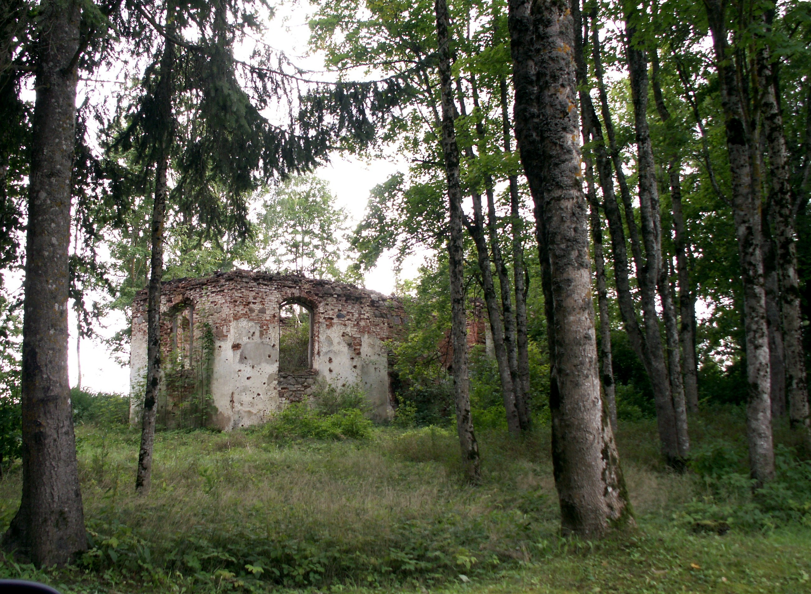 Lielaucės bažnyčios griuvėsiai, Lielaucės pagastas, Latvija